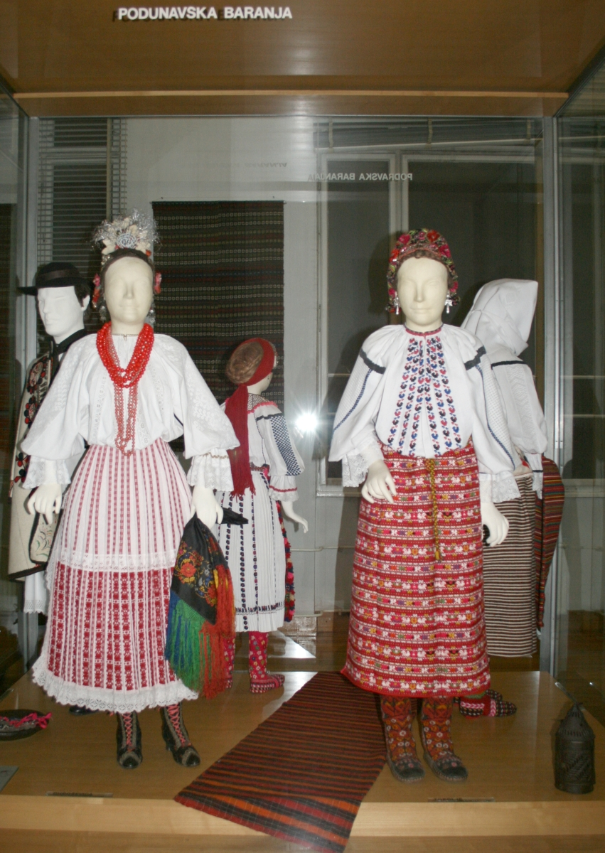 snimljeno tijekom Noći muzeja u Etnografskom muzeju u Zagrebu